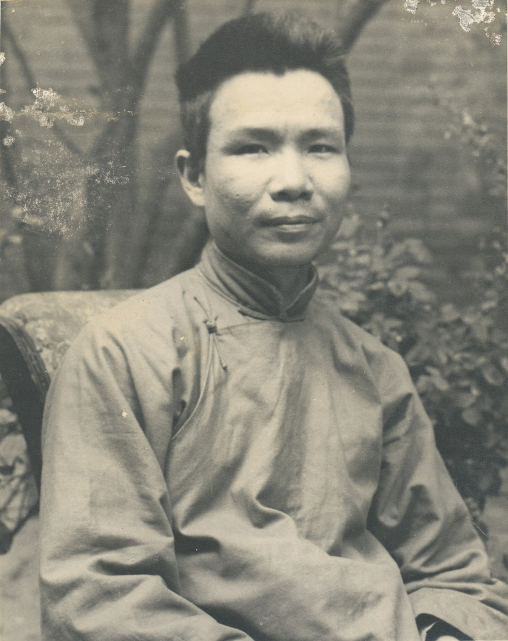 中文（香港）: 陶希聖教授嘅舊照片，過咗50年，進入公共領域。攝影嘅作者不明。